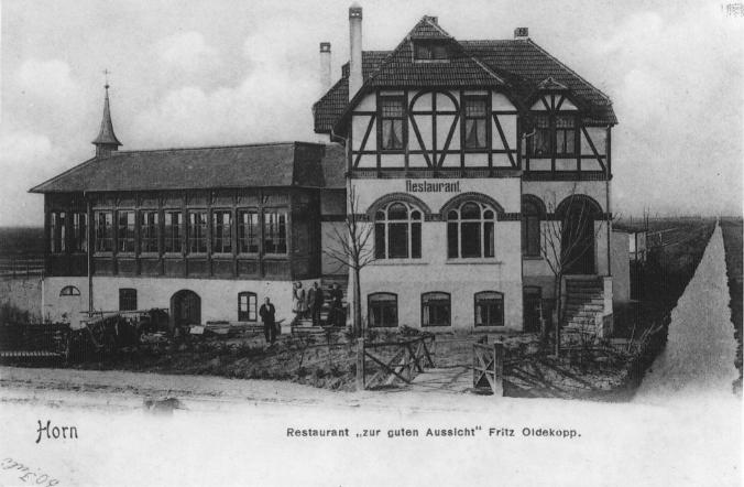 Haltepunkt Horn mit Gastwirtschaft der Kleinbahn Bremen - Tarmstedt "Jan Reiners"